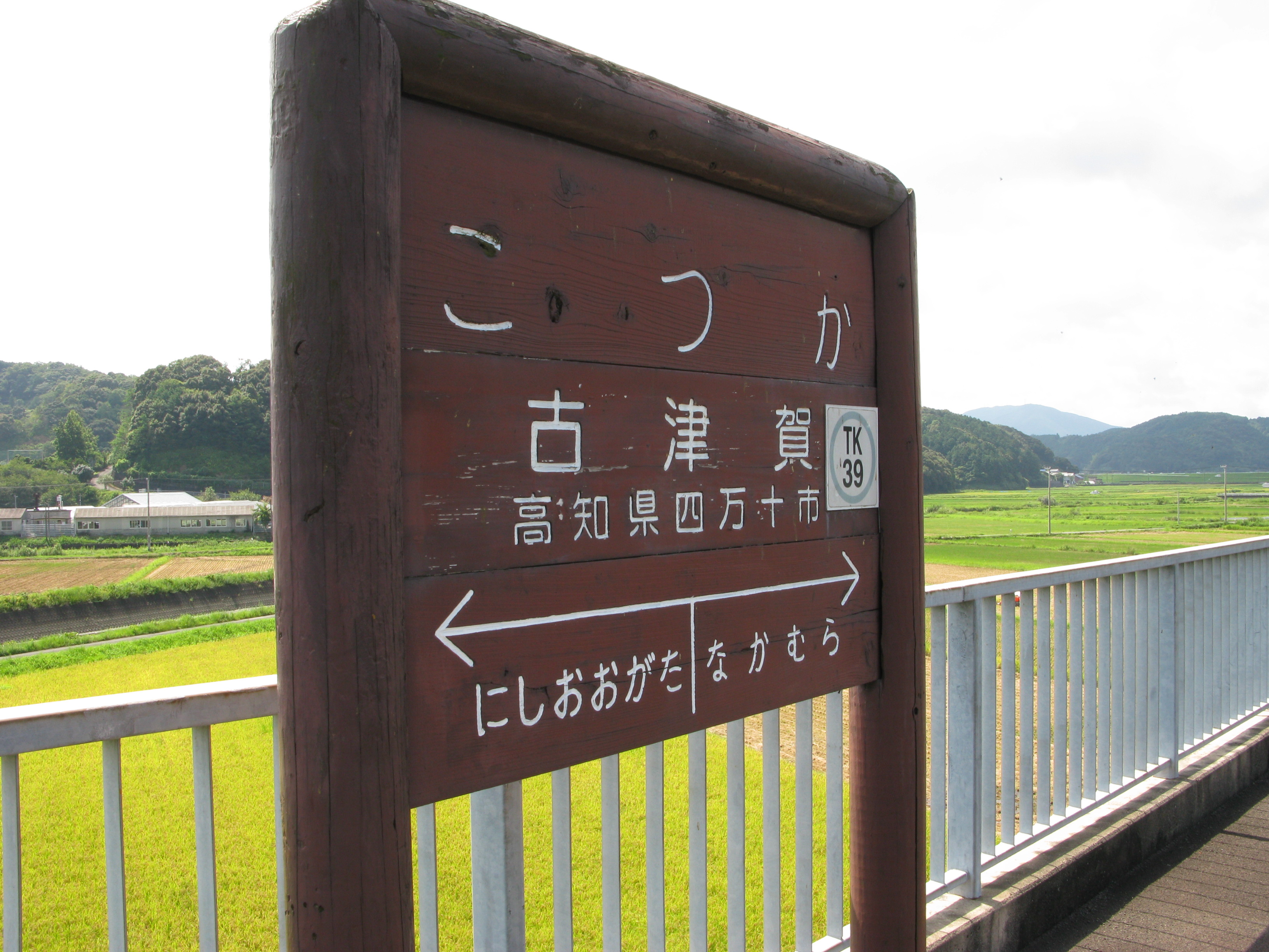 古津賀駅 駅名表示板